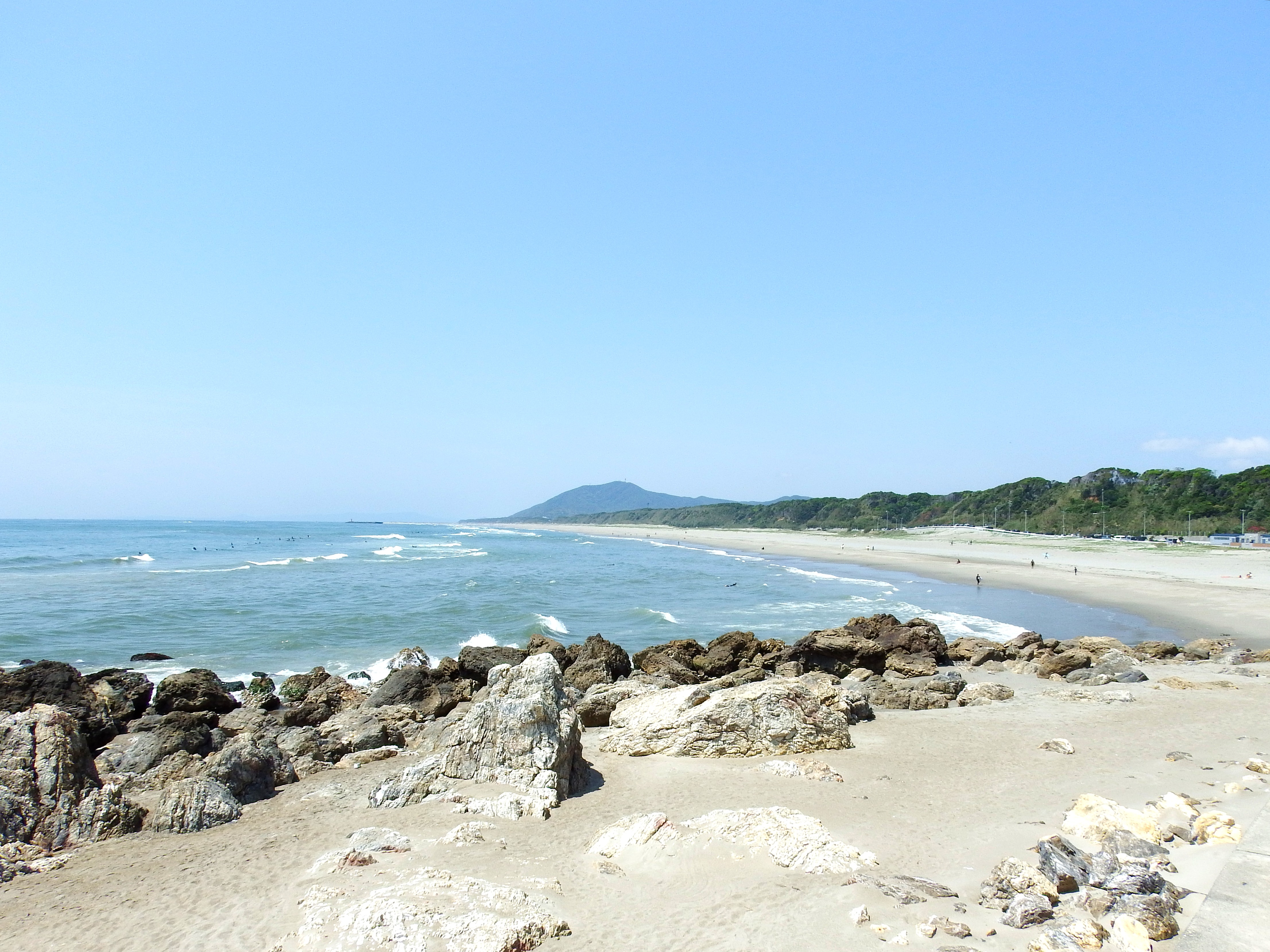 太平洋ロングビーチ